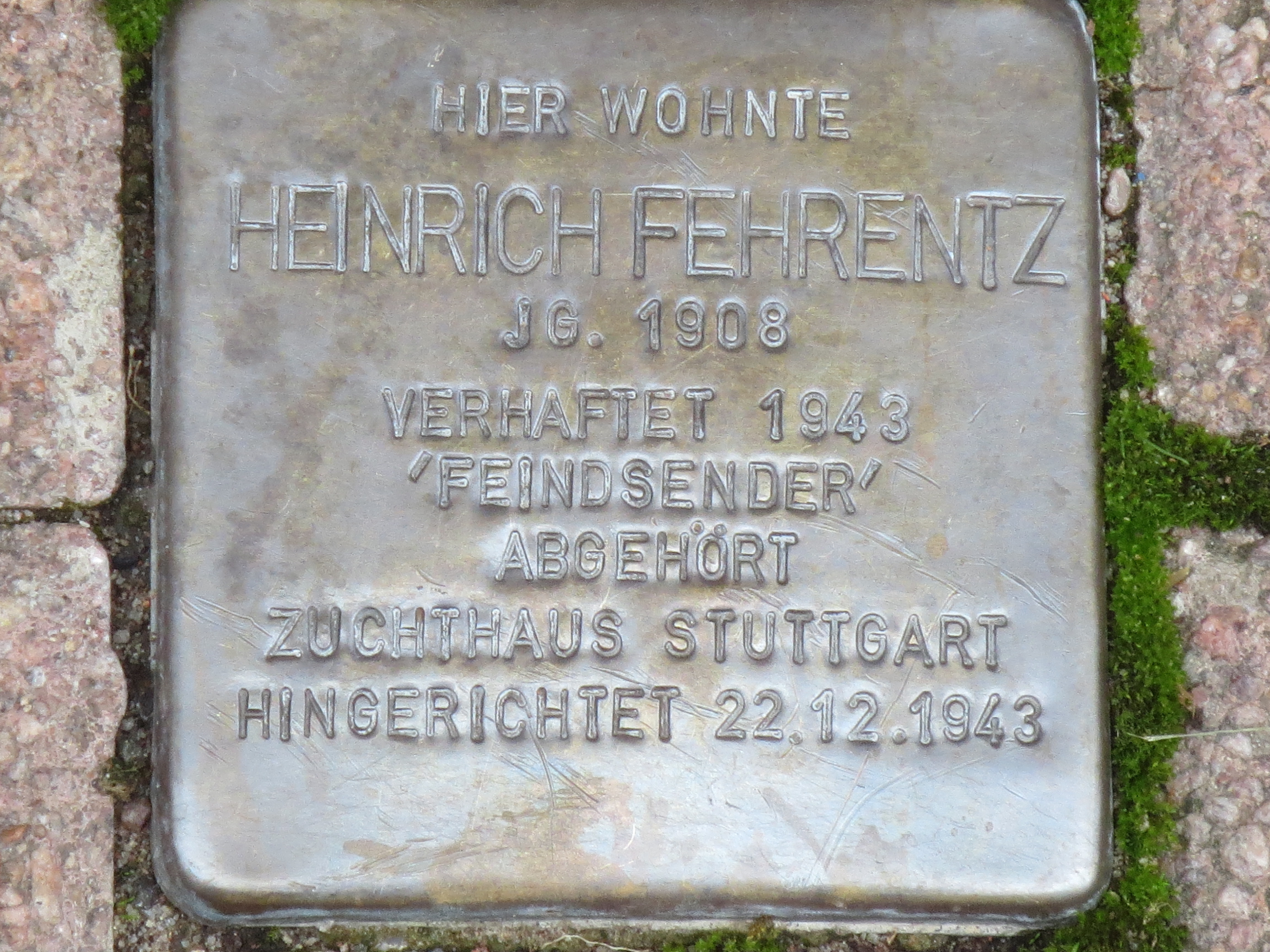 Stolperstein für Heinrich Fehrenz